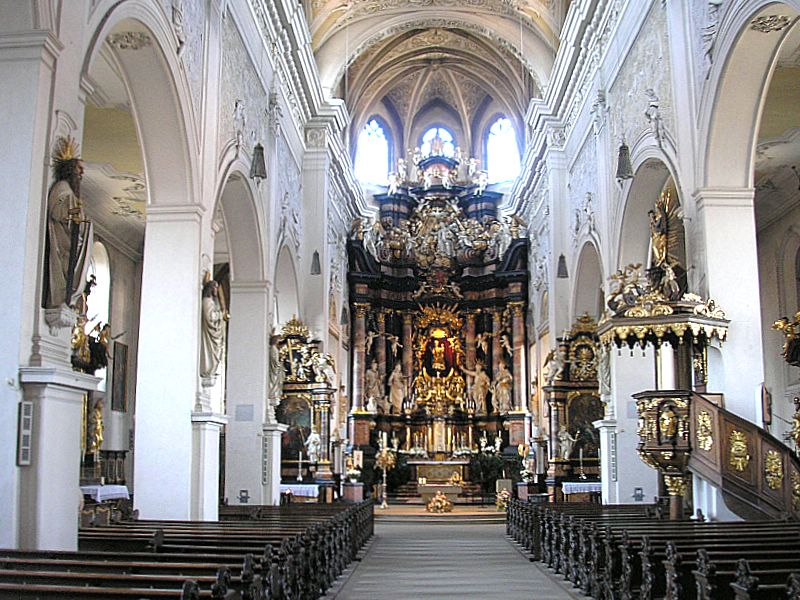 Obere Pfarrkirche Bamberg (Oberfranken). Innenraum nach Osten. Eigene Aufnahme, April 2007 / Upper Parish Church (Bamberg, Upper Franconia, Germany). Interior, looking east. Own photo, April 2007